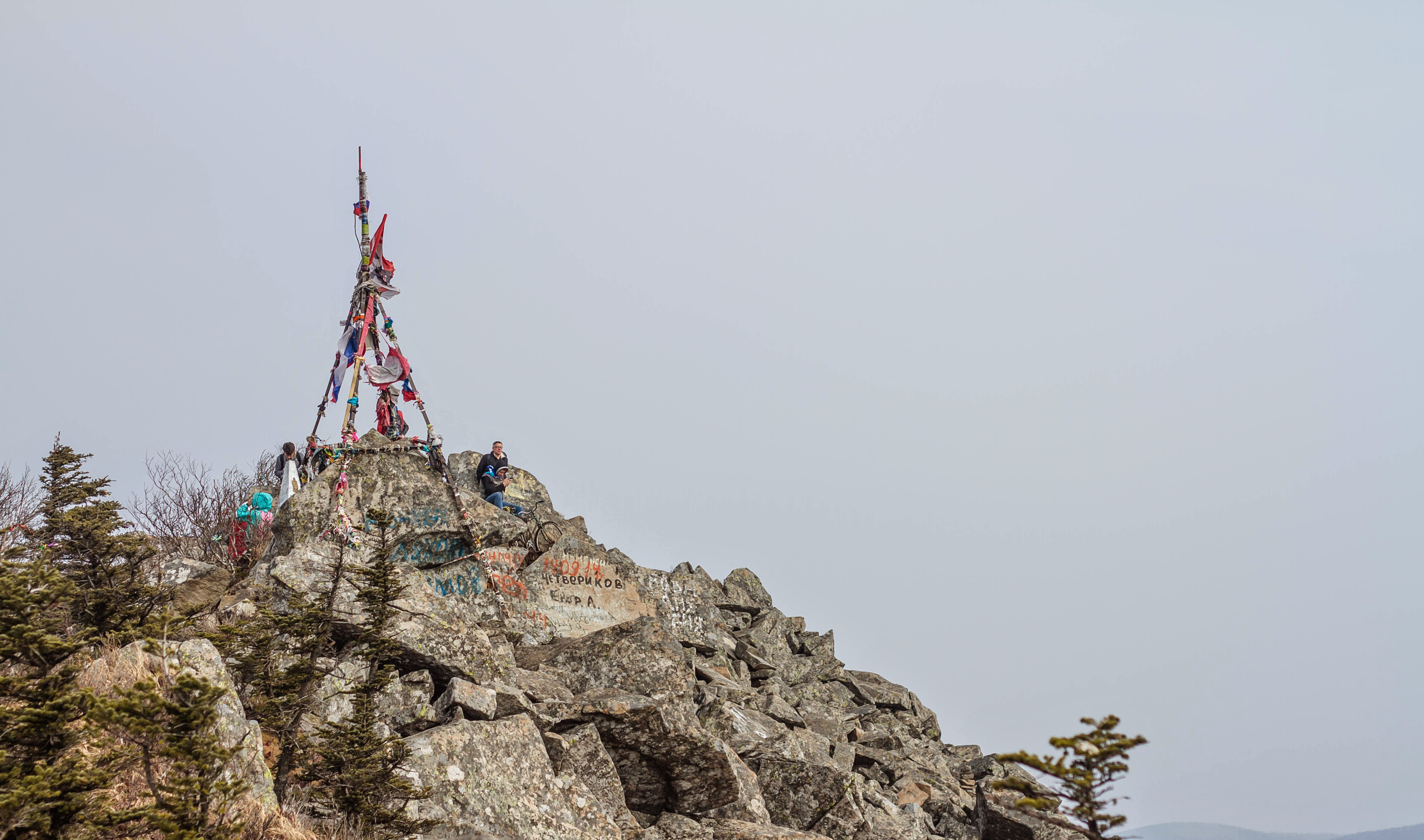 Вершина Пидана